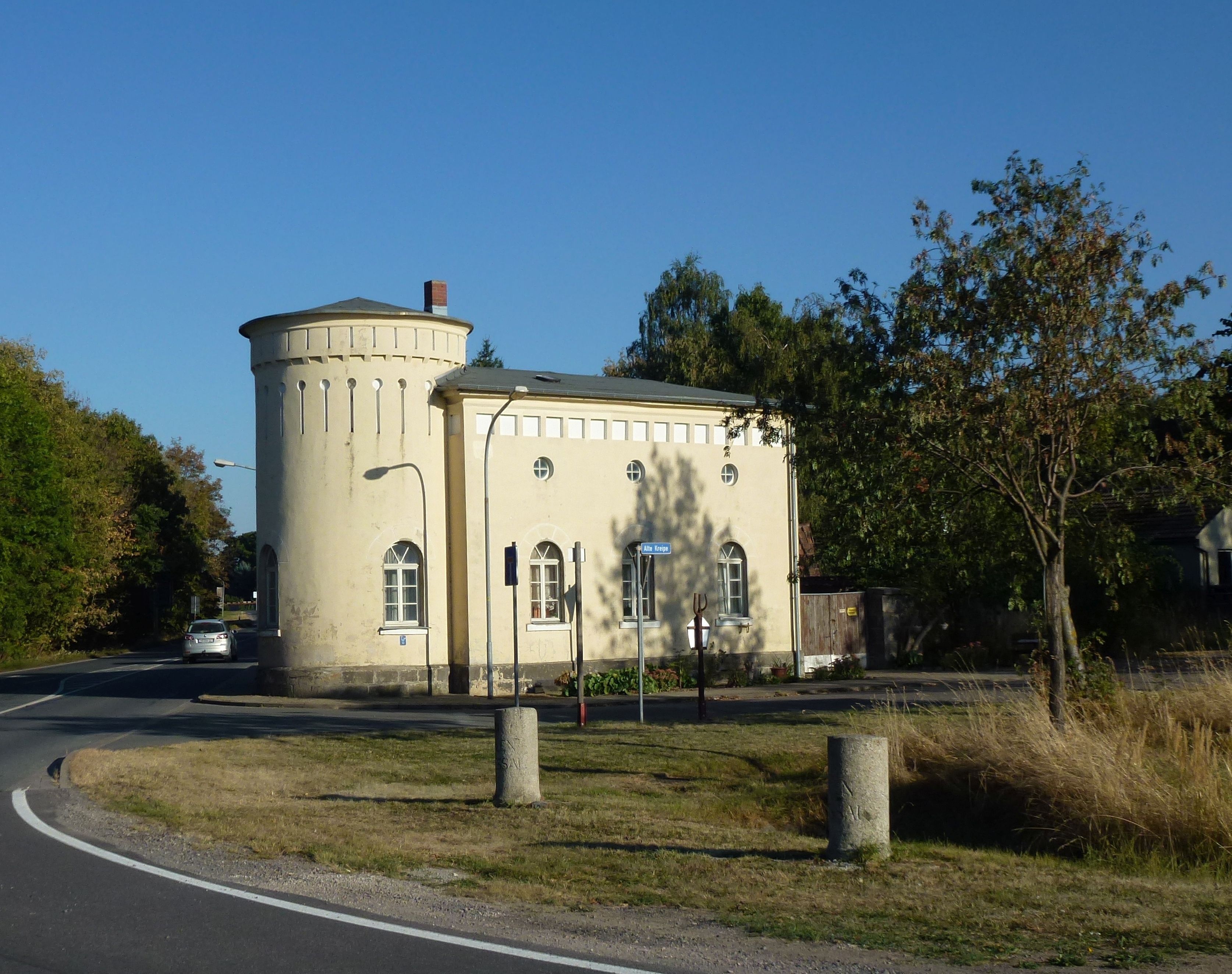 Gelbes Haus in der Quedlinburger Straße 11b, davor zwei Meilensteine. Das Gelbe Haus stammt aus dem ersten Drittel des 19. Jahrhunderts und wurde von einem unbekannten Baumeister im klassizistischen Stil errichtet. Es war einst Wege- und Zollhaus und mit einer Schranke ausgestattet. Dort verlief die Zollgrenze mehrerer Landstraßen zwischen dem Herzogtum Anhalt-Bernburg und dem Königreich Preußen.